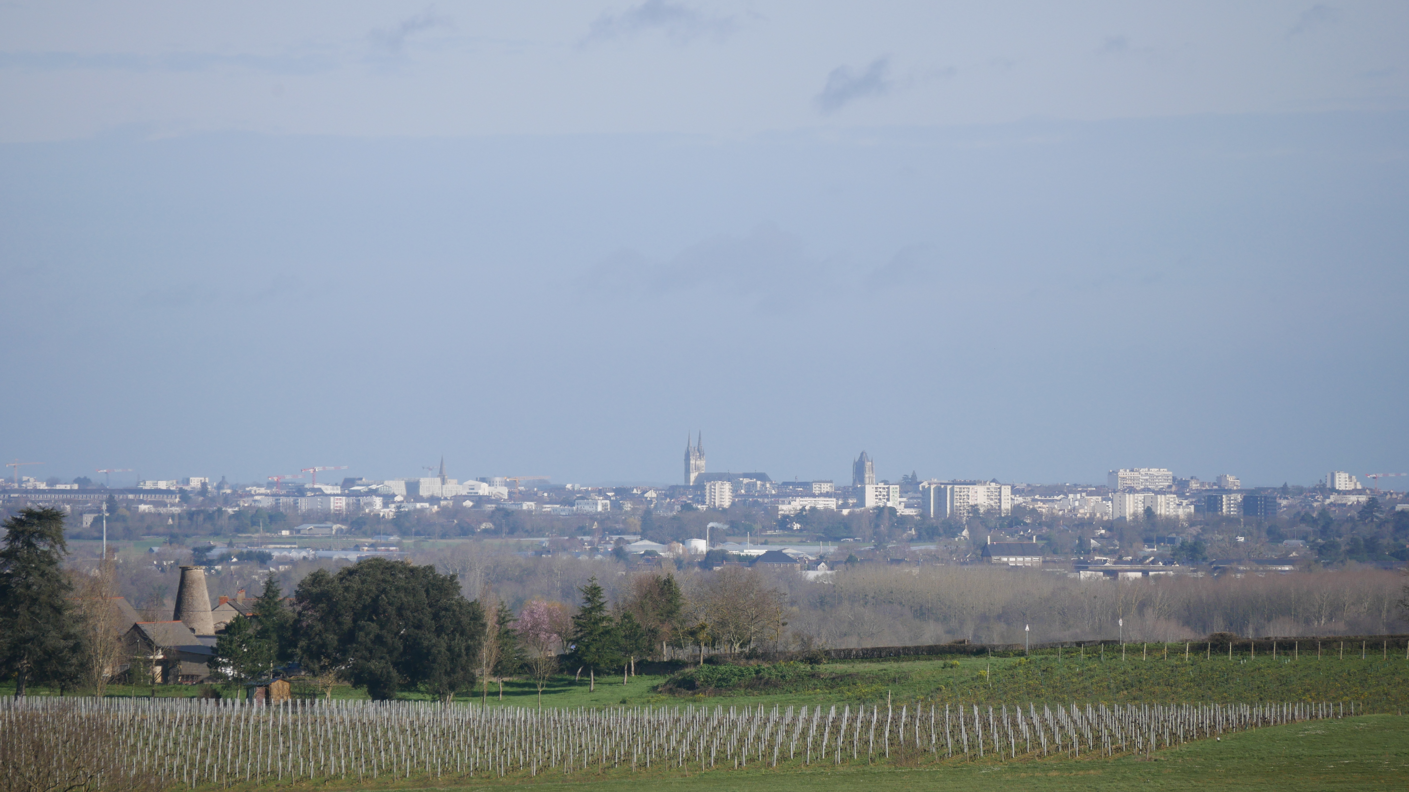 La ville d'Angers depuis Mozé-sur-Louet (Maine-et-Loire, France).